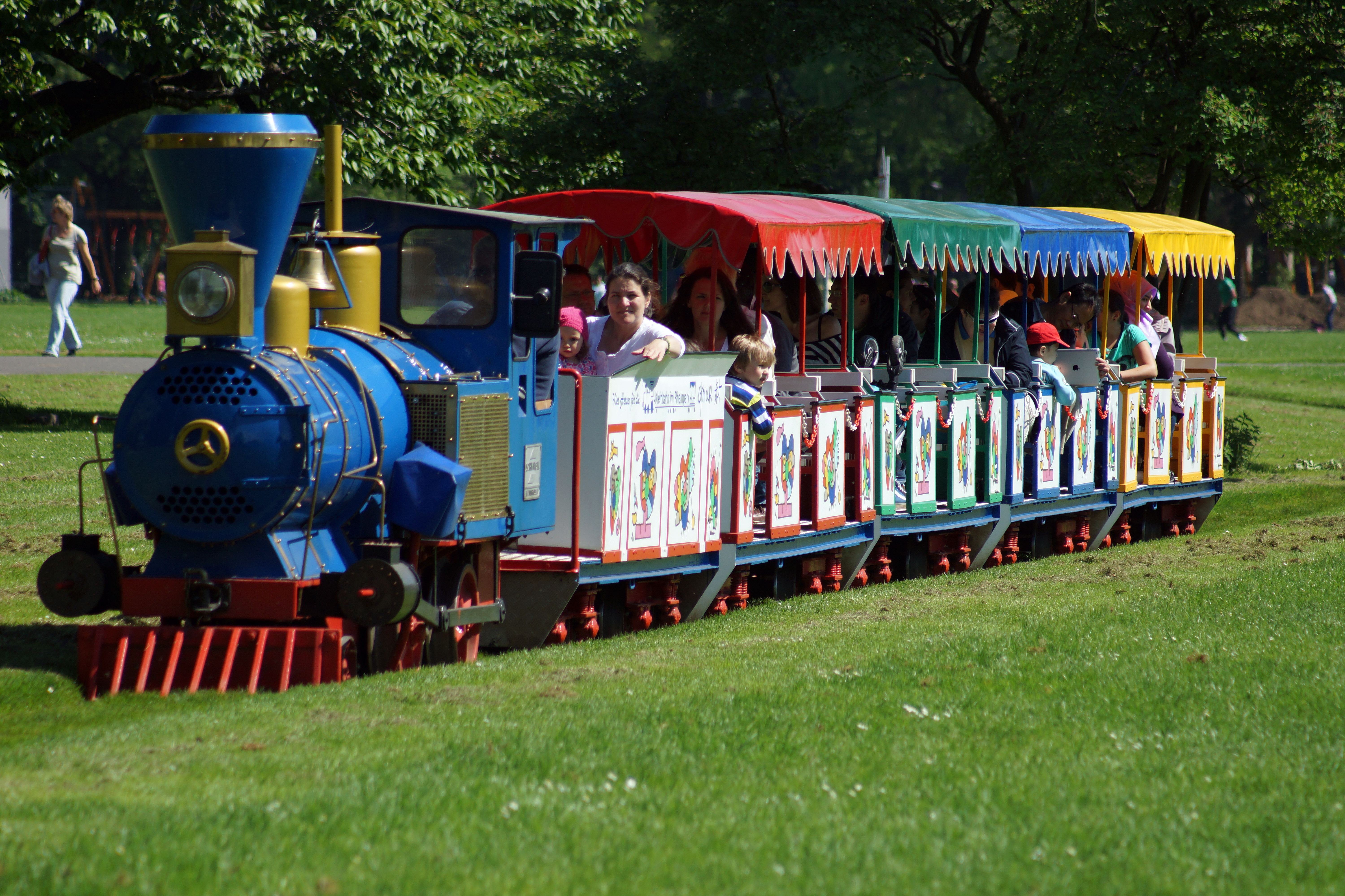 Westernzug 2 der Kölner Rheinparkbahn mit der blauen Lokomotive.